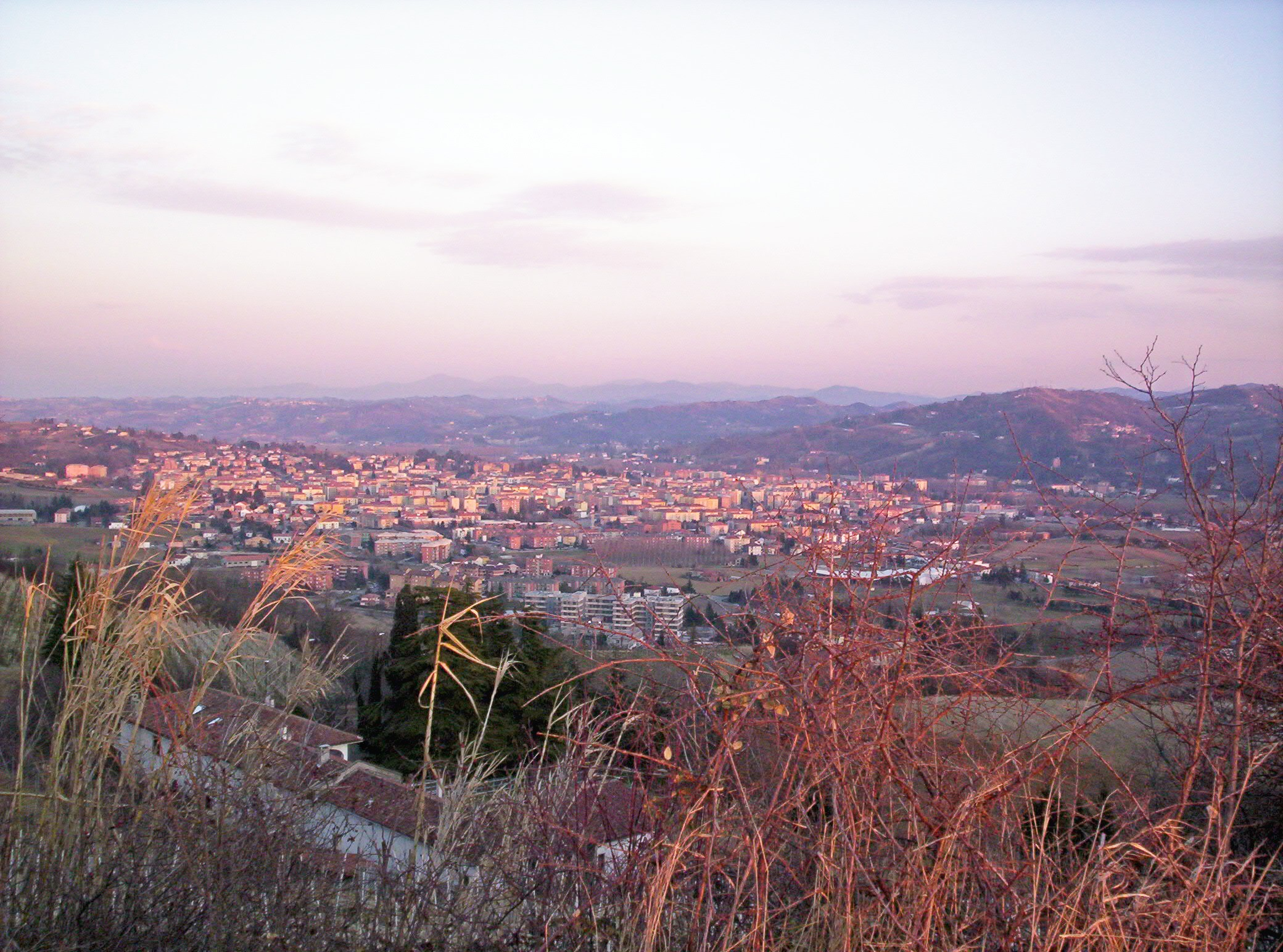 Acqui Terme - vista dalla Langa Astigiana.